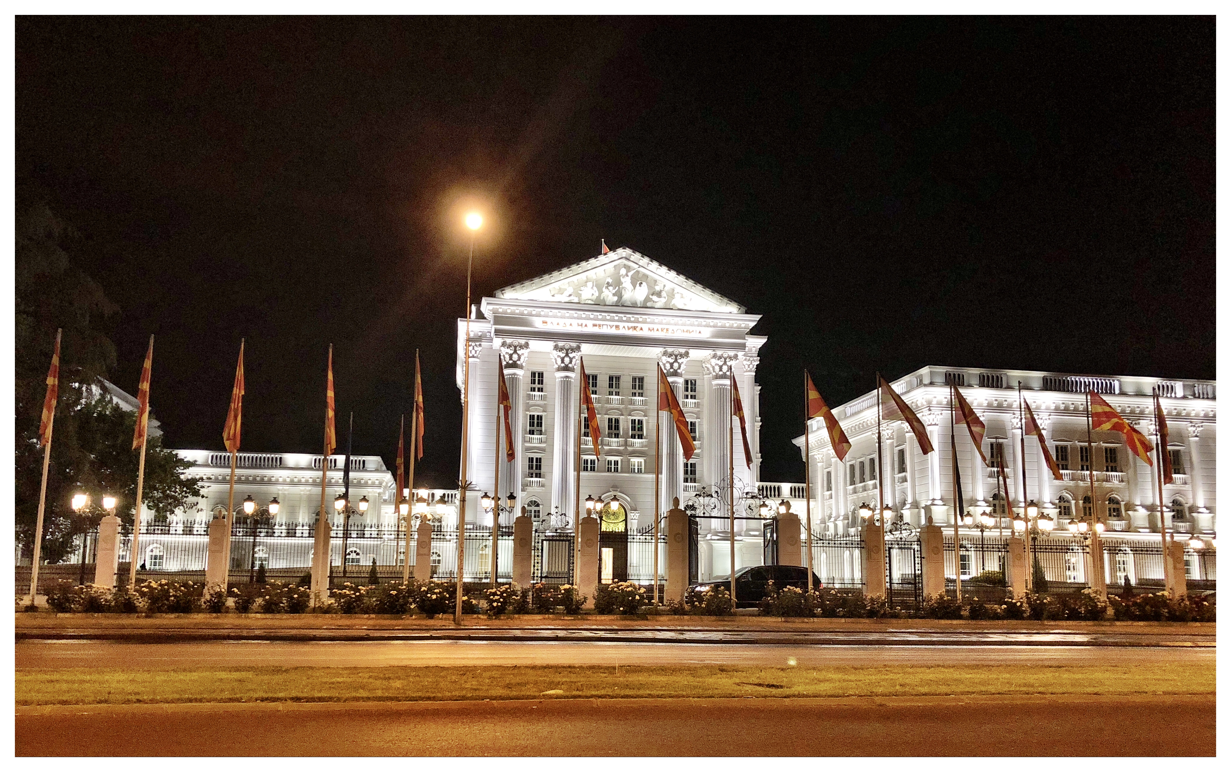 Skopje, Macedonia Skopje, Macedonia